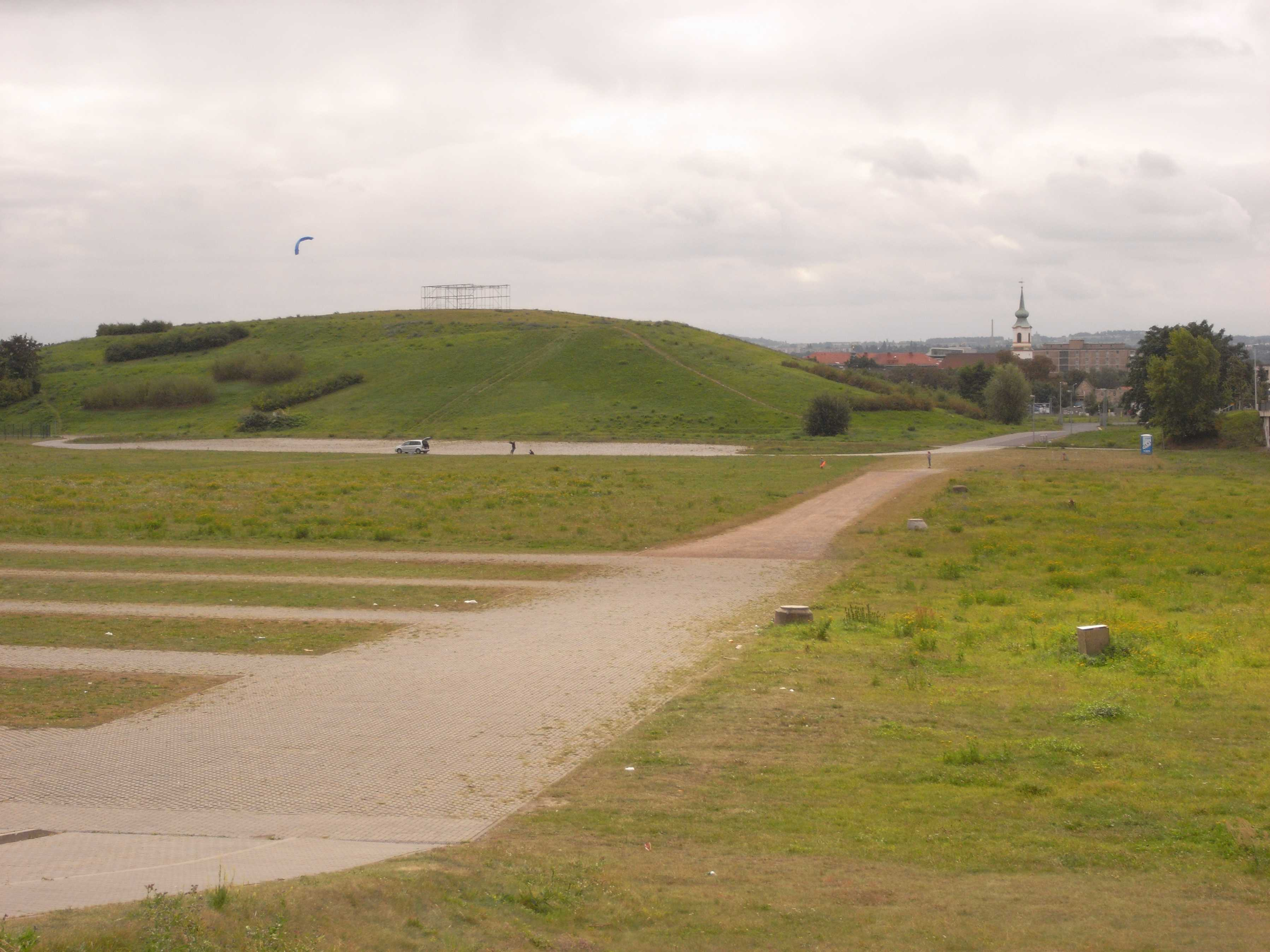 Großes Ostragehege, Trümmerberg (Dresden, Sachsen, Deutschland)